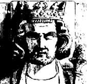 Gisant de Carloman Ier (751-771)